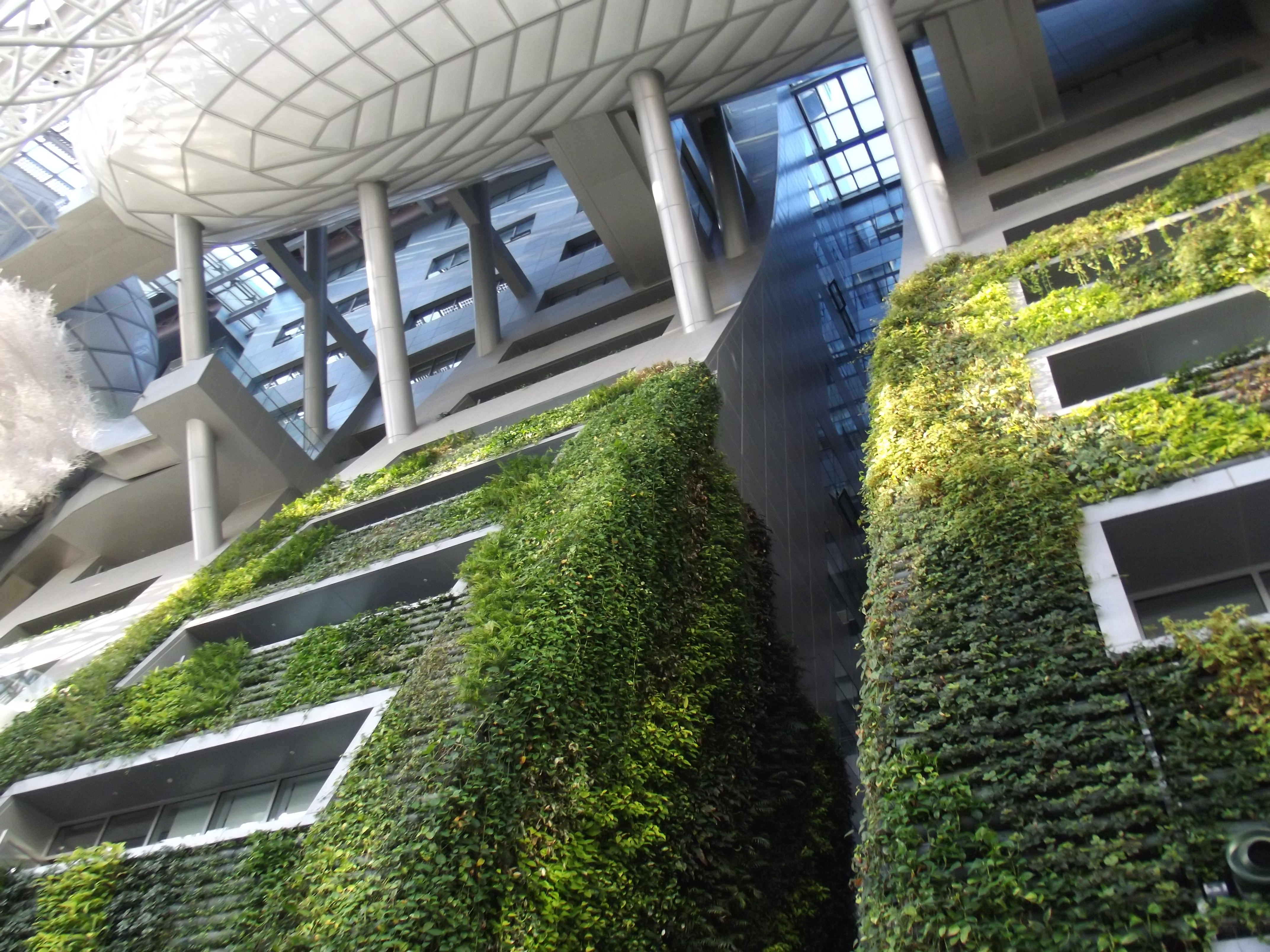 Groene muur in het stadshuis van Seoul